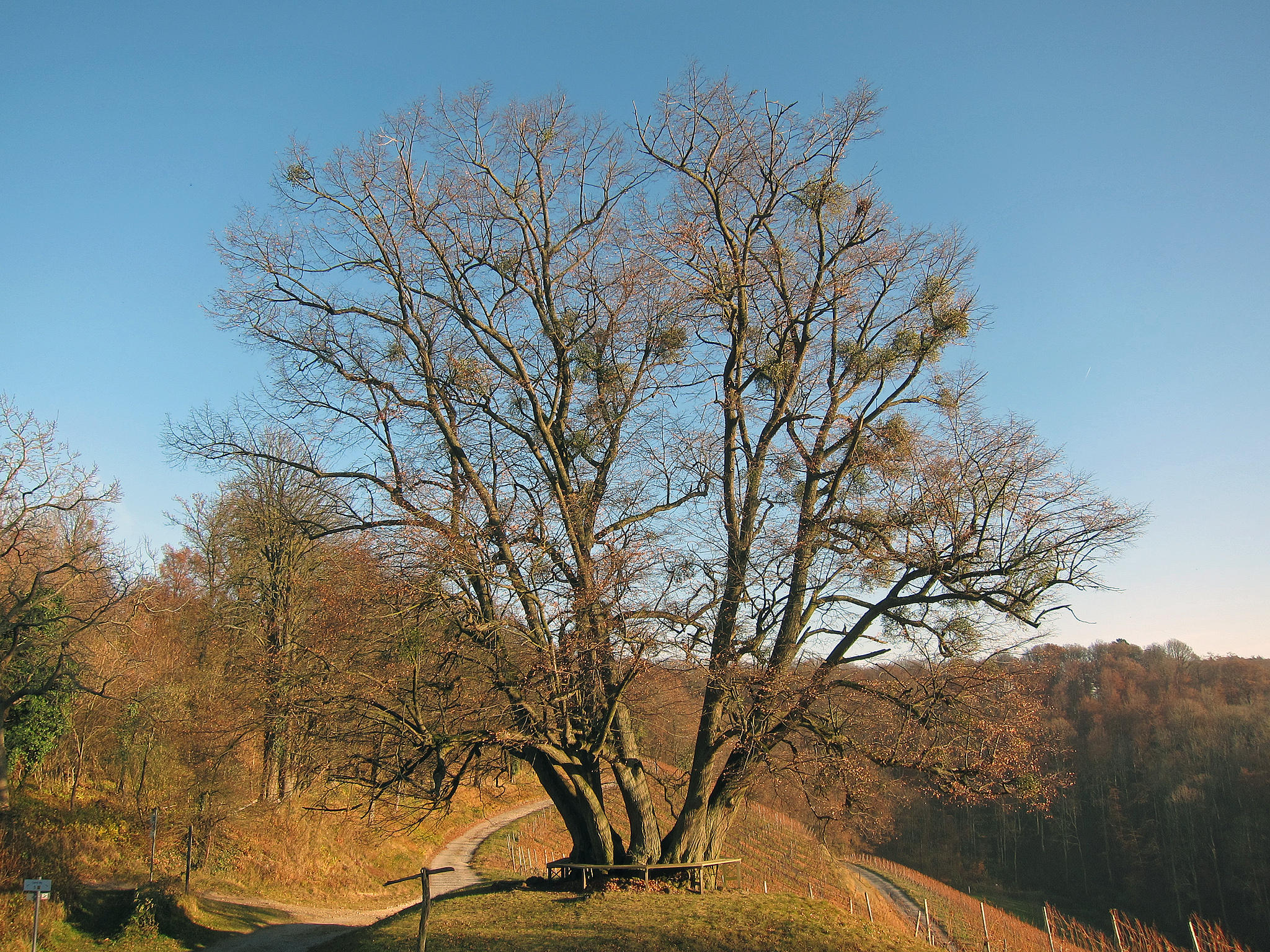 Linde Castell